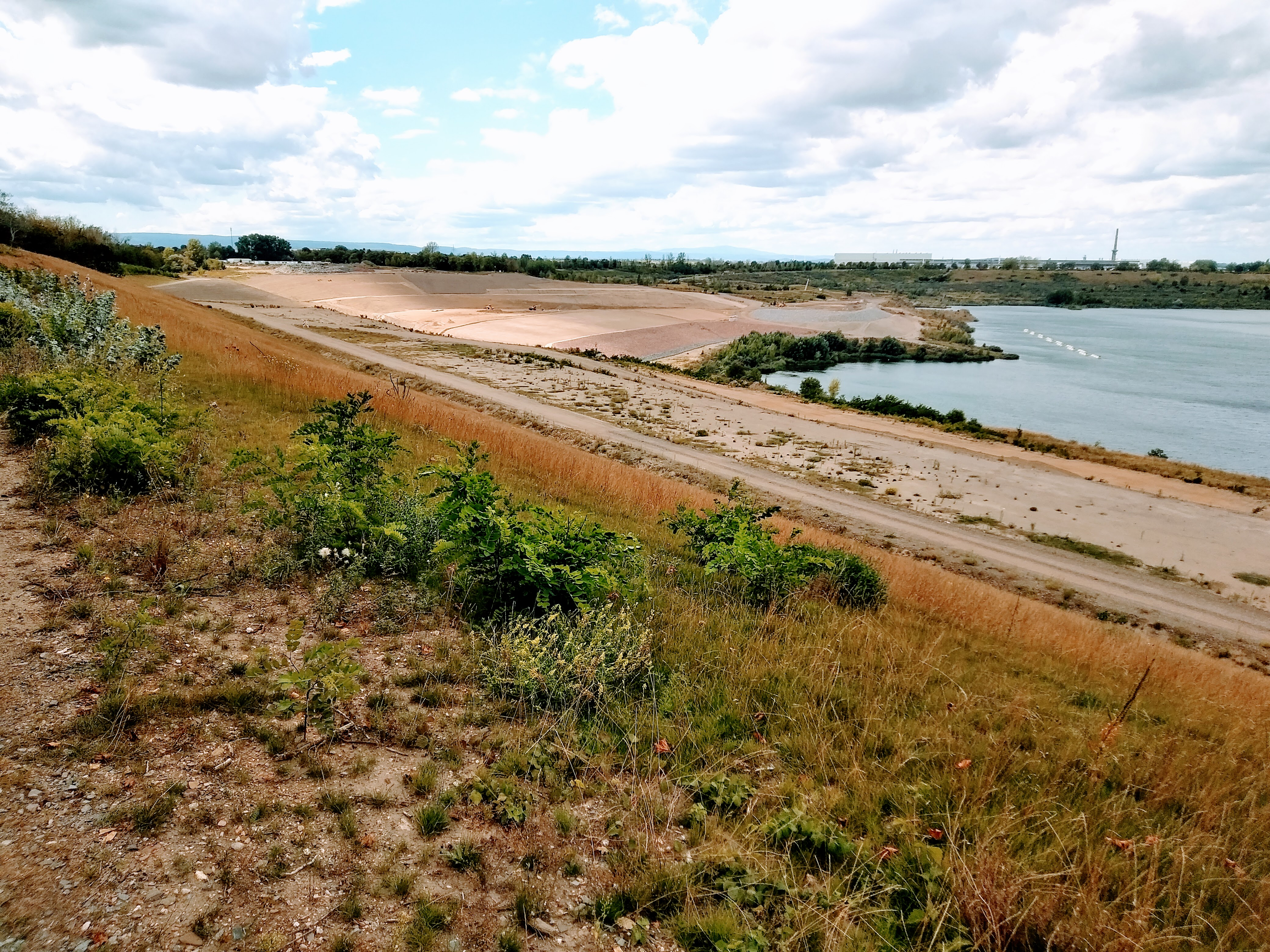 Südwestseite des Concordiasees im August 2020 mit Blick auf die Sanierungsarbeiten der Böschung